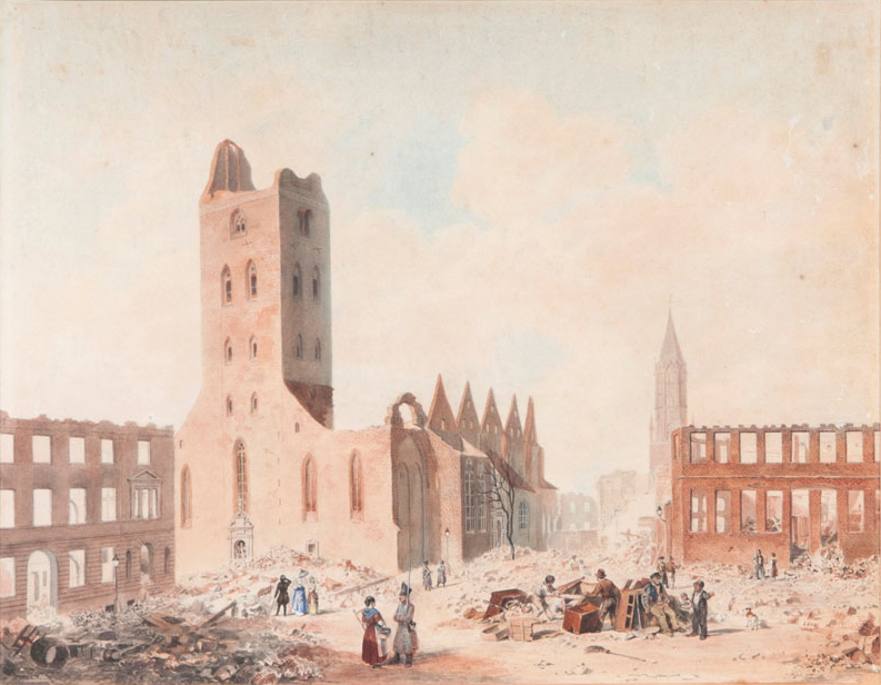 Adolf Besemann: St. Petri und St. Jacobi nach dem großen Hamburger Brand 1842 Aquarell, 33,5 × 42,5 cm. Rechts unten Monogramm: AB 1842